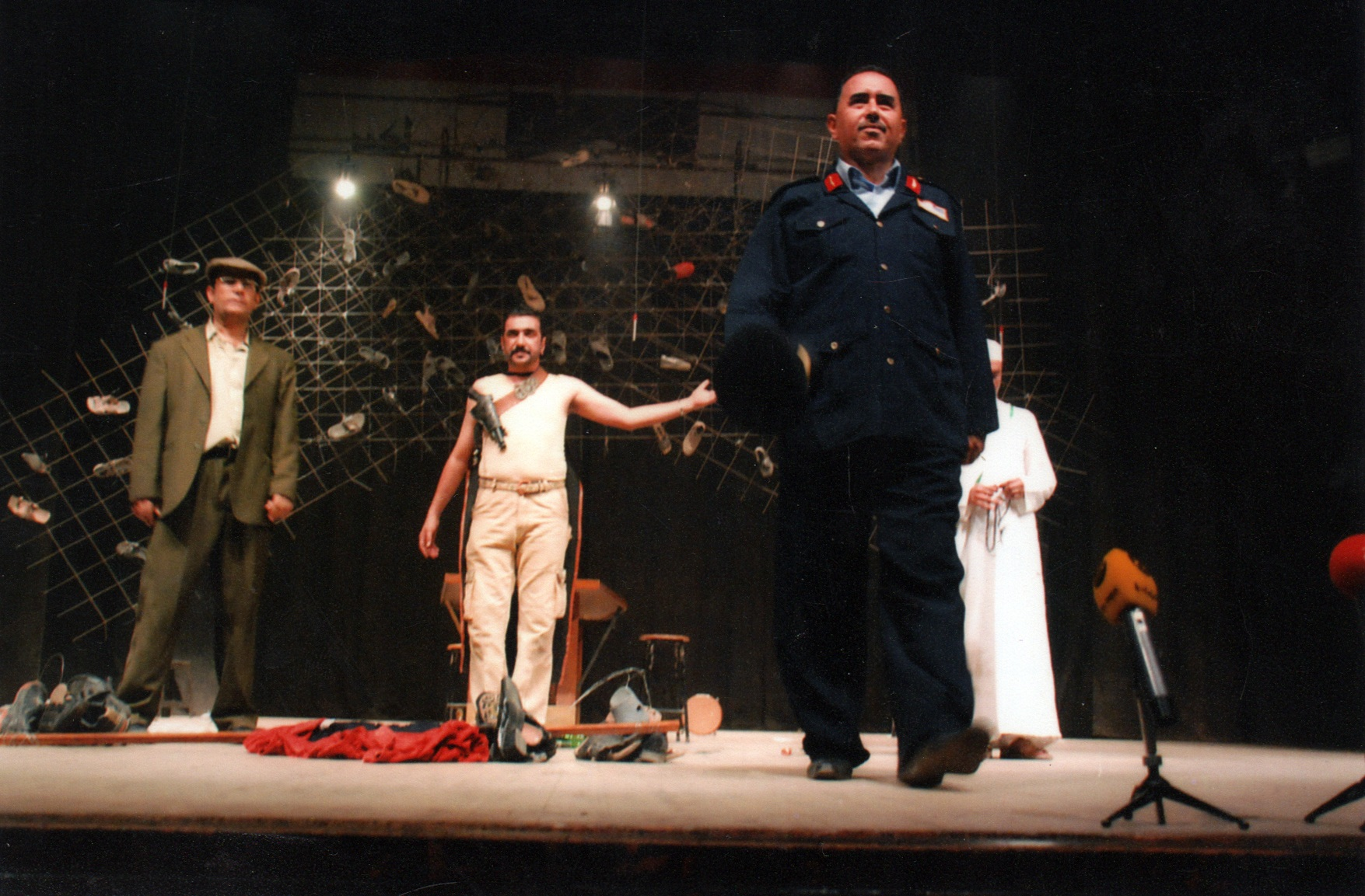 تحية مسرح